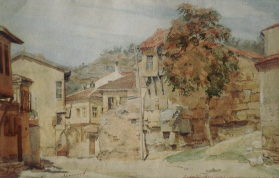 Пловдив - тепе Алтъ при читалище „Иван Вазов“ от Атанас Бакларов.